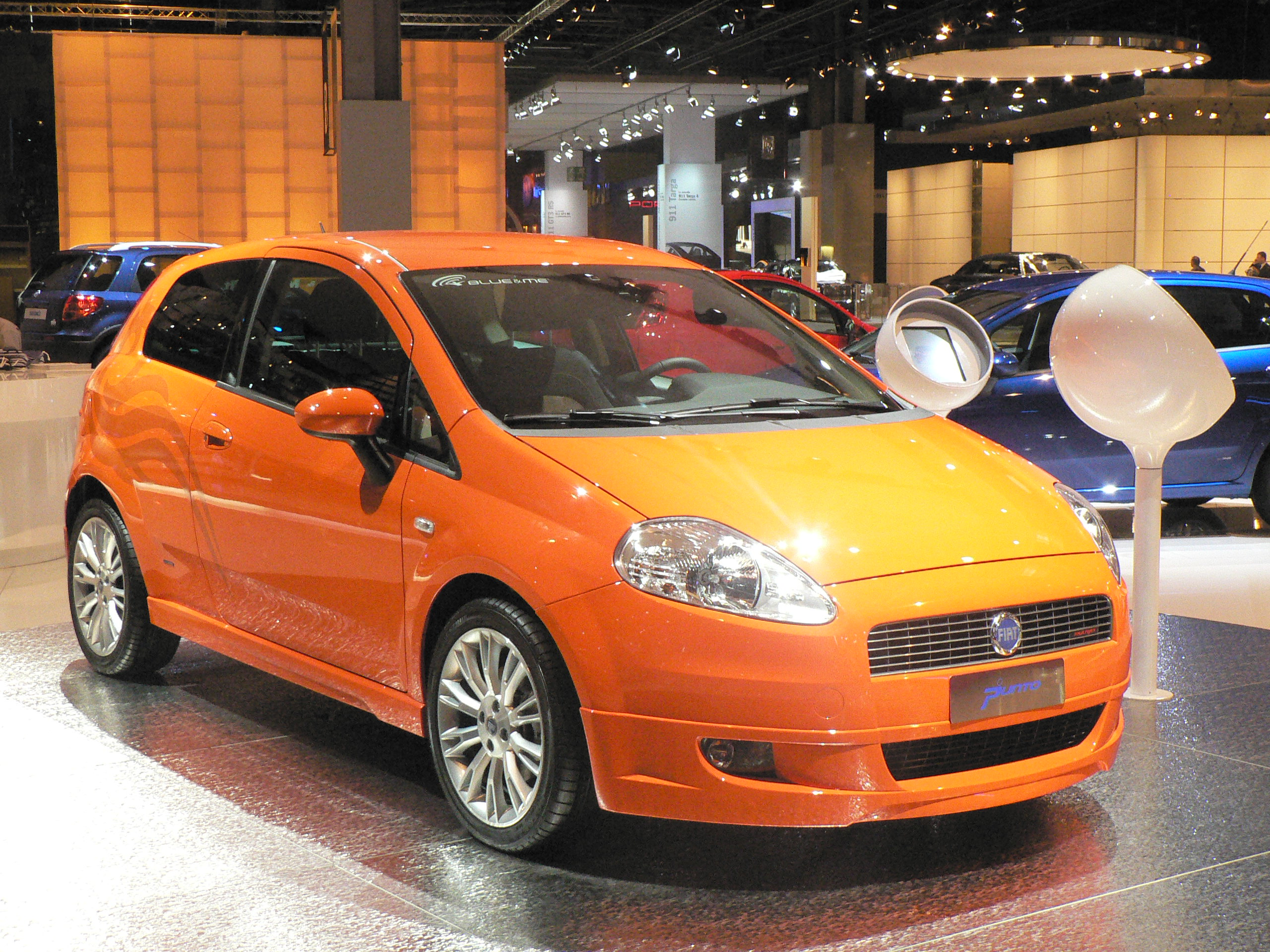 Mondial de l automobile de Paris (October 2006)